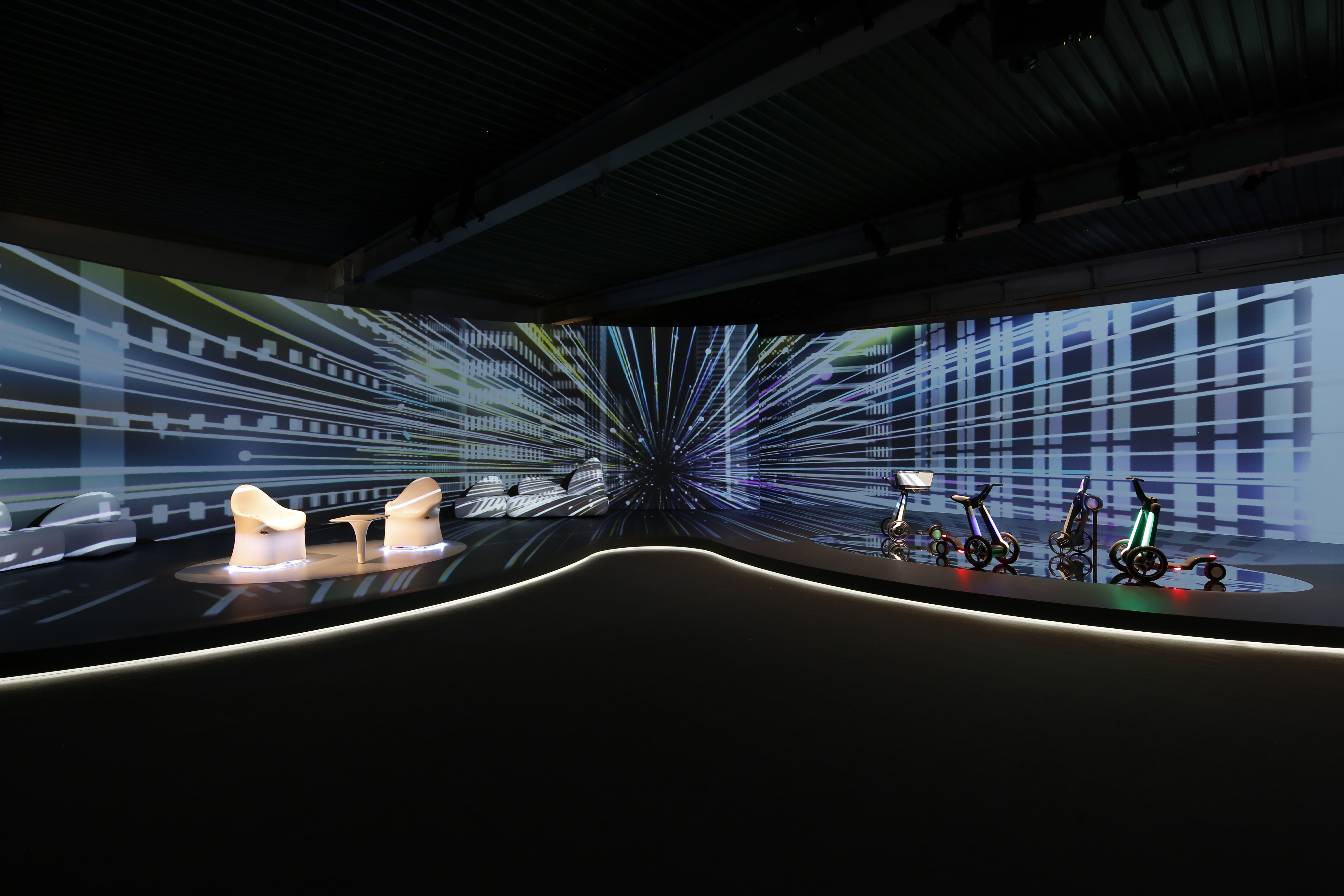 ImagineNewDays